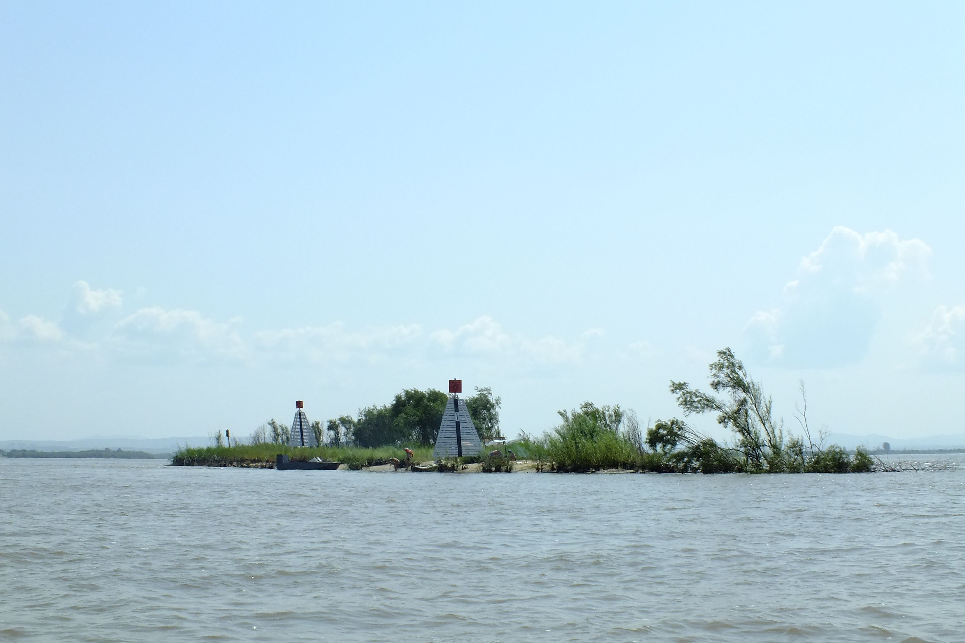 Створные знаки на Амуре